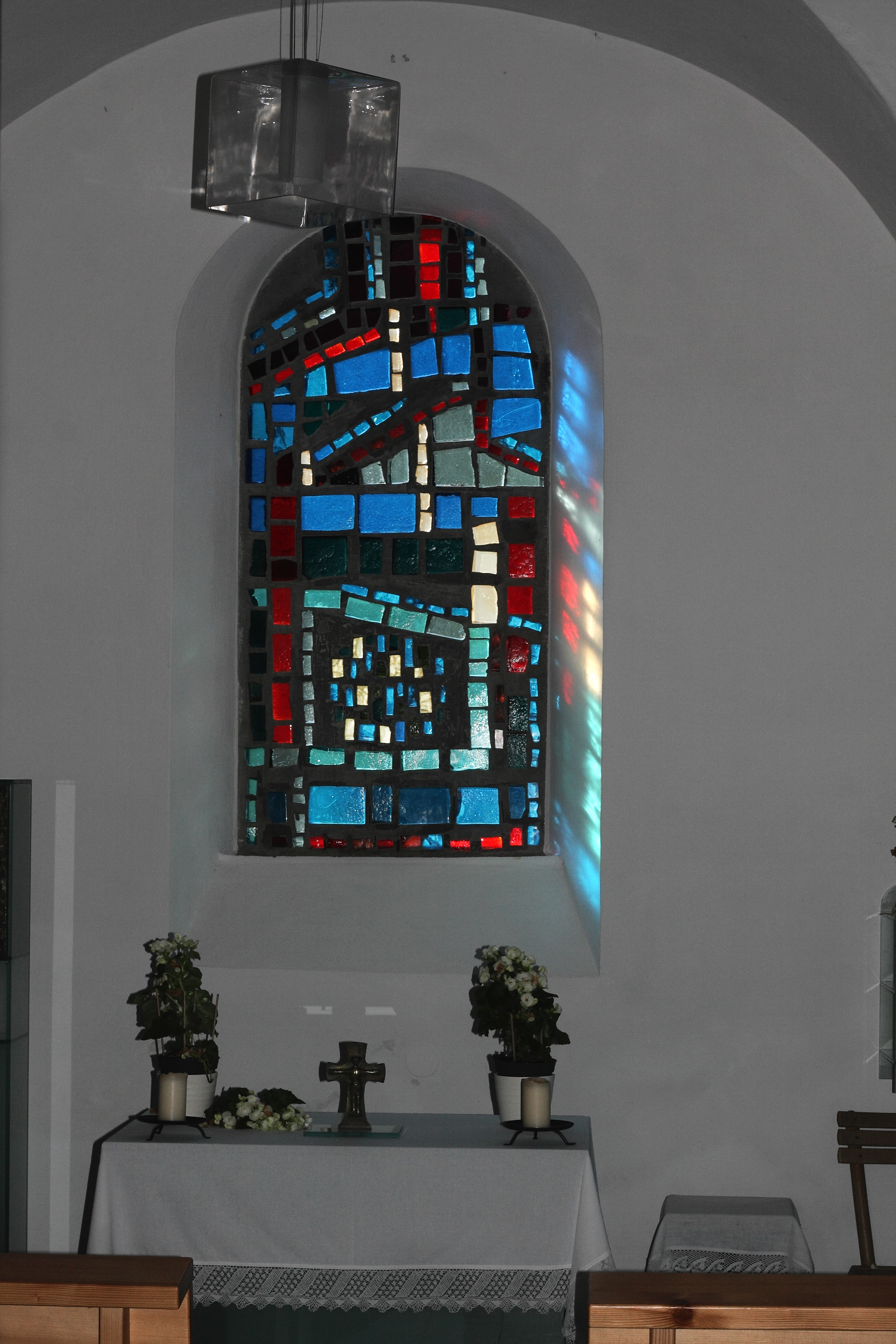 Pfarrkirche Leonstein: Blick in die angebaute Kapelle beim Haupteingang (Nordseite)